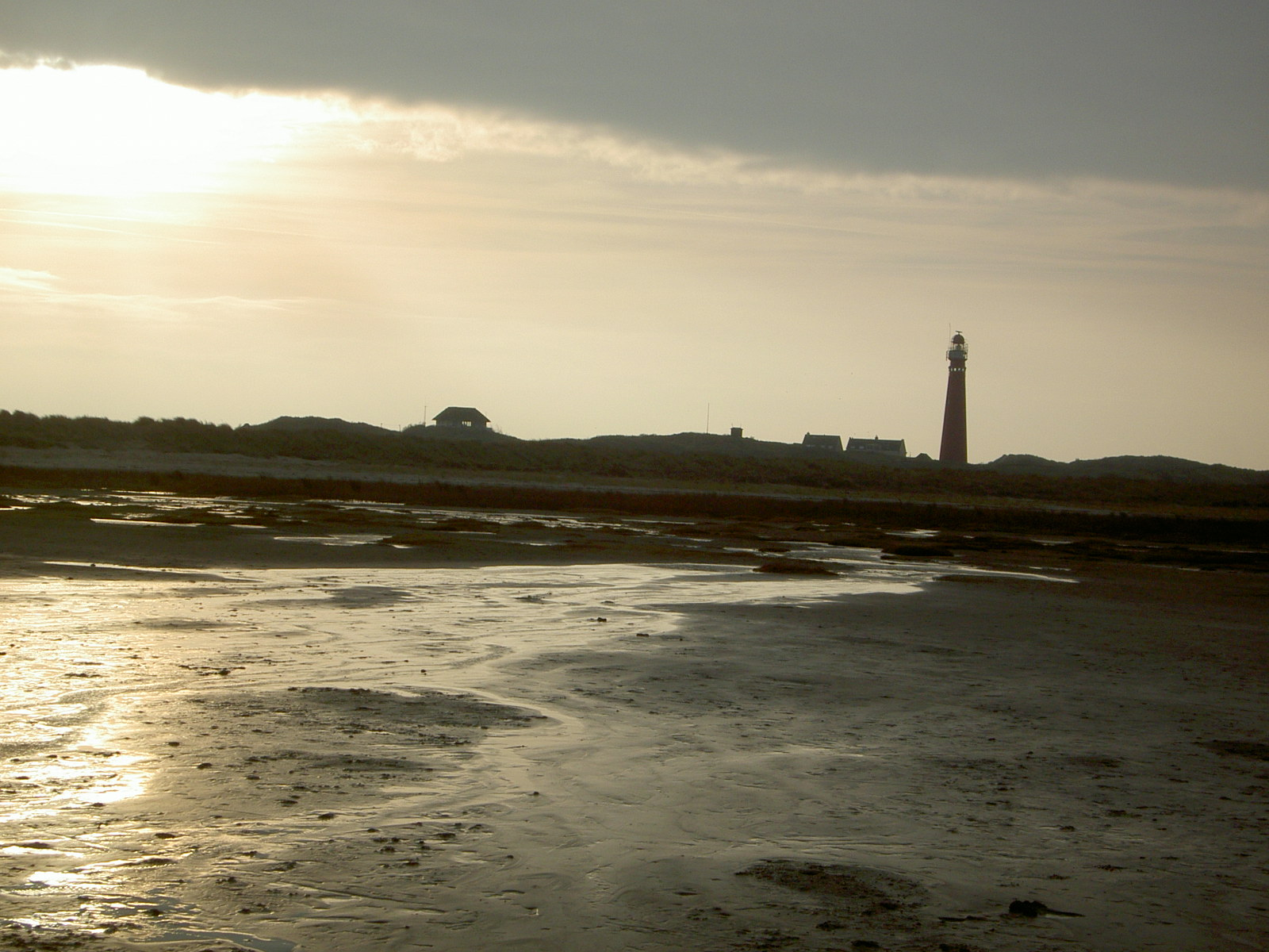 Schiermonnikoog (NL)